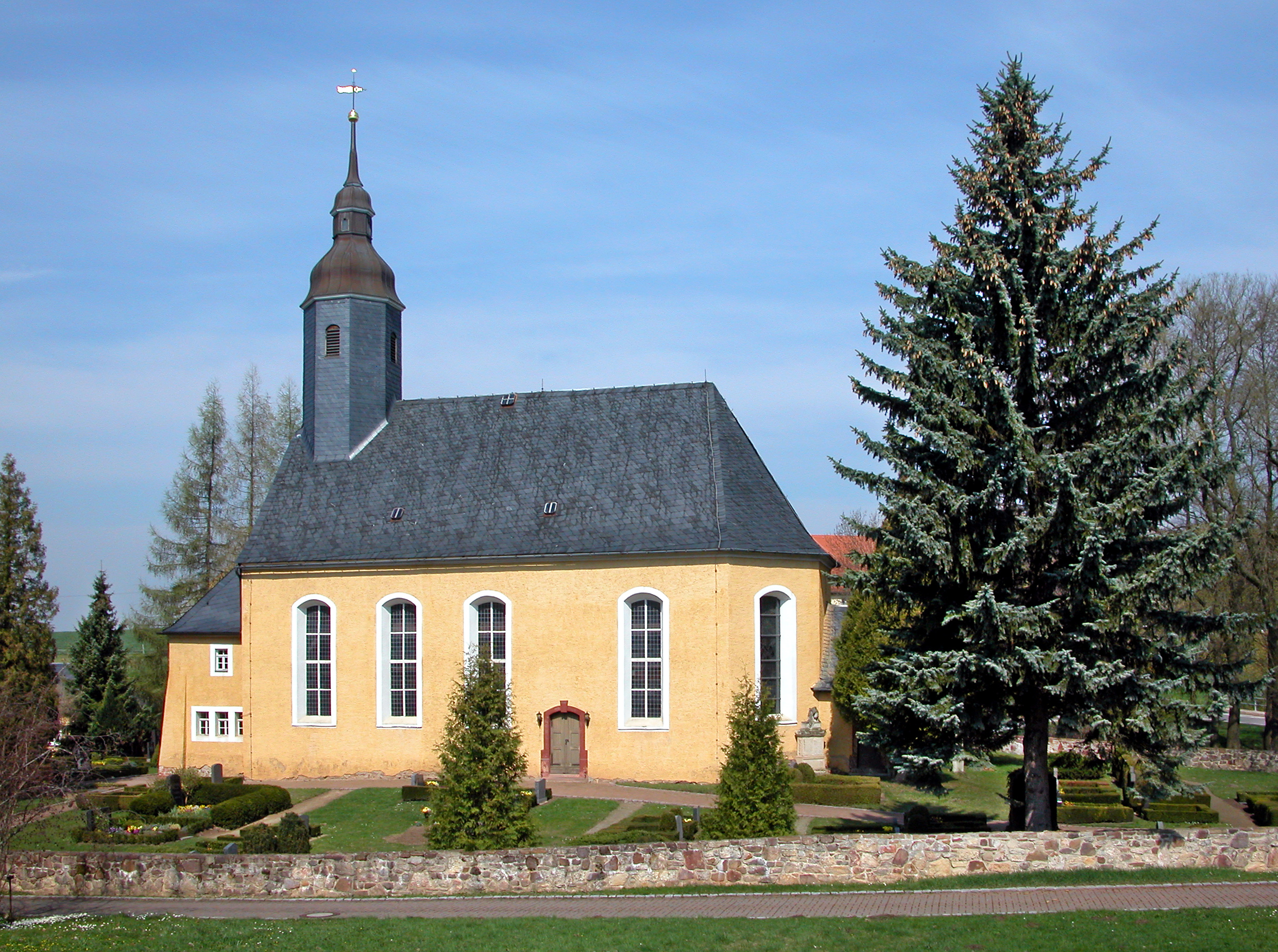 21.03.2009 04703 Bockelwitz: Dorfkirche, 1797 an Stelle einer älteren, baufälligen Kirche neu erbaut. Die Pläne stammen vom Amtszimmermeister August Bormann aus Wermsdorf, der den Bau auch zusammen mit dem Amtsmaurermeister Gottfried Wartig, beide aus Wermsdorf, ausführte. Kirchenpatron war Friedrich August von Carlowitz, der Besitzer des Ritterguts Kroptewitz. [DSCN35653.TIF]20090321010DR.JPG(c)Blobelt